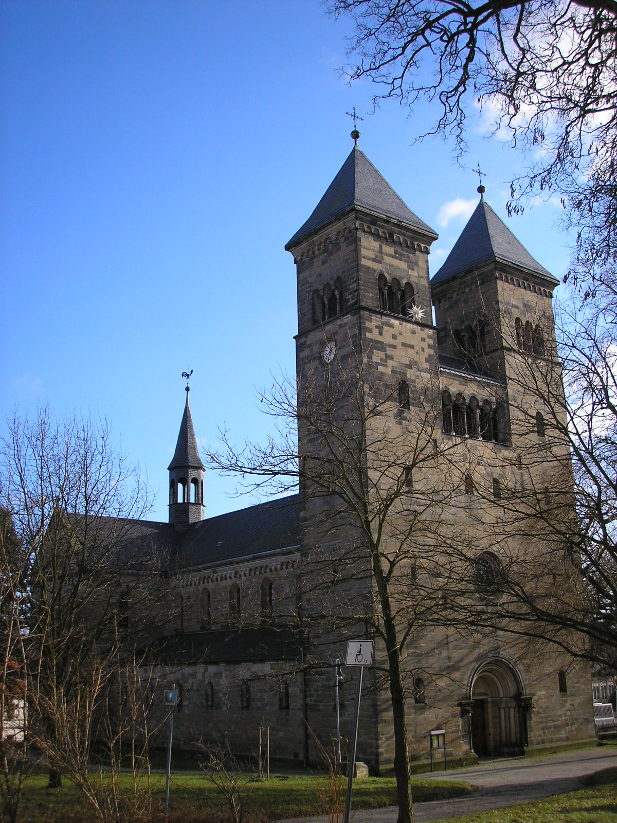 Die Klosterkirche in Bad Klosterlausnitz (Thüringen).